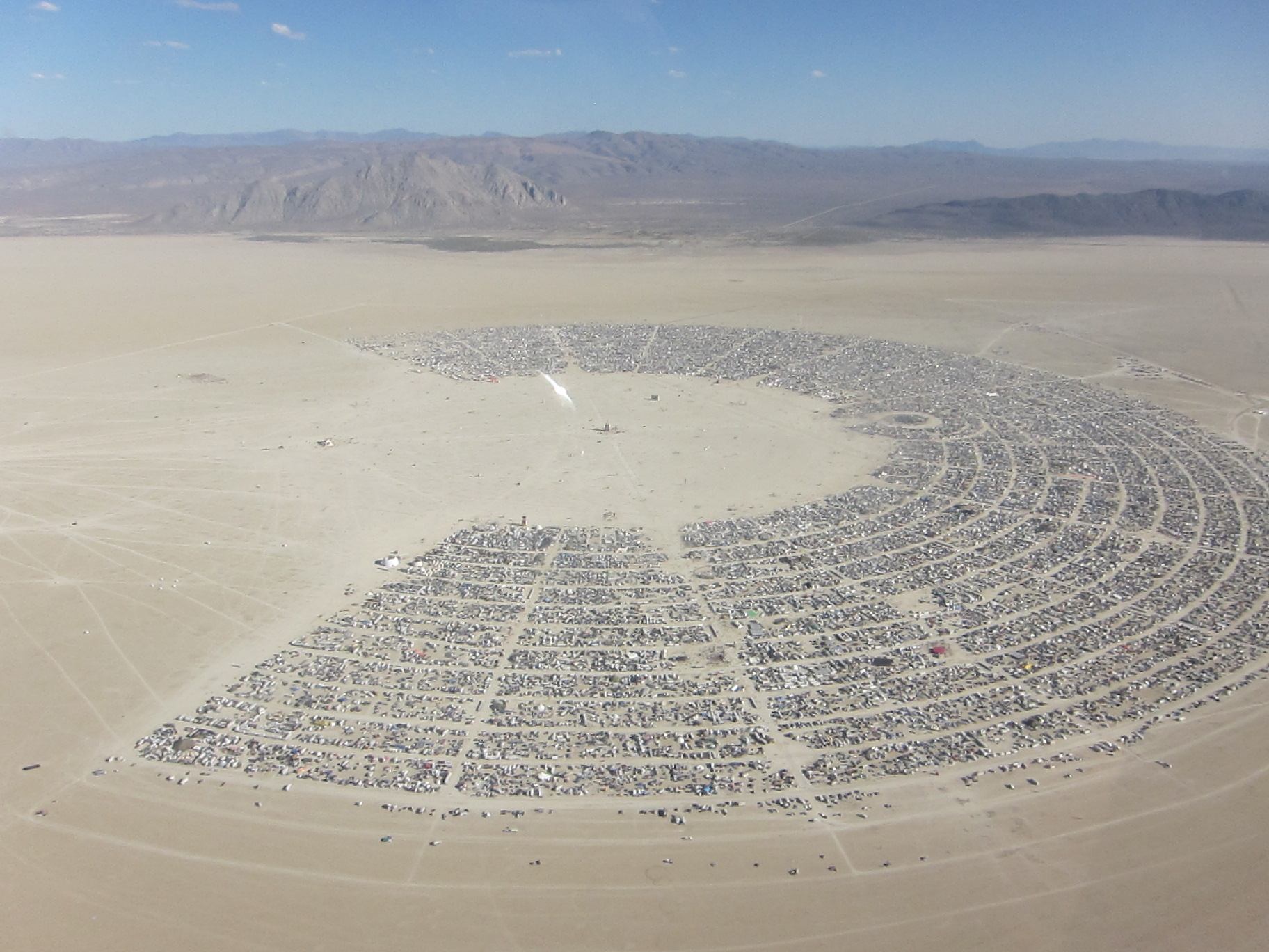 Burning Man aerial, 2010